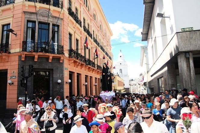 Procesión de la efigie de santa Mariana de Jesús, por las calles del Centro Histórico de la ciudad de Quito, capital de Ecuador.